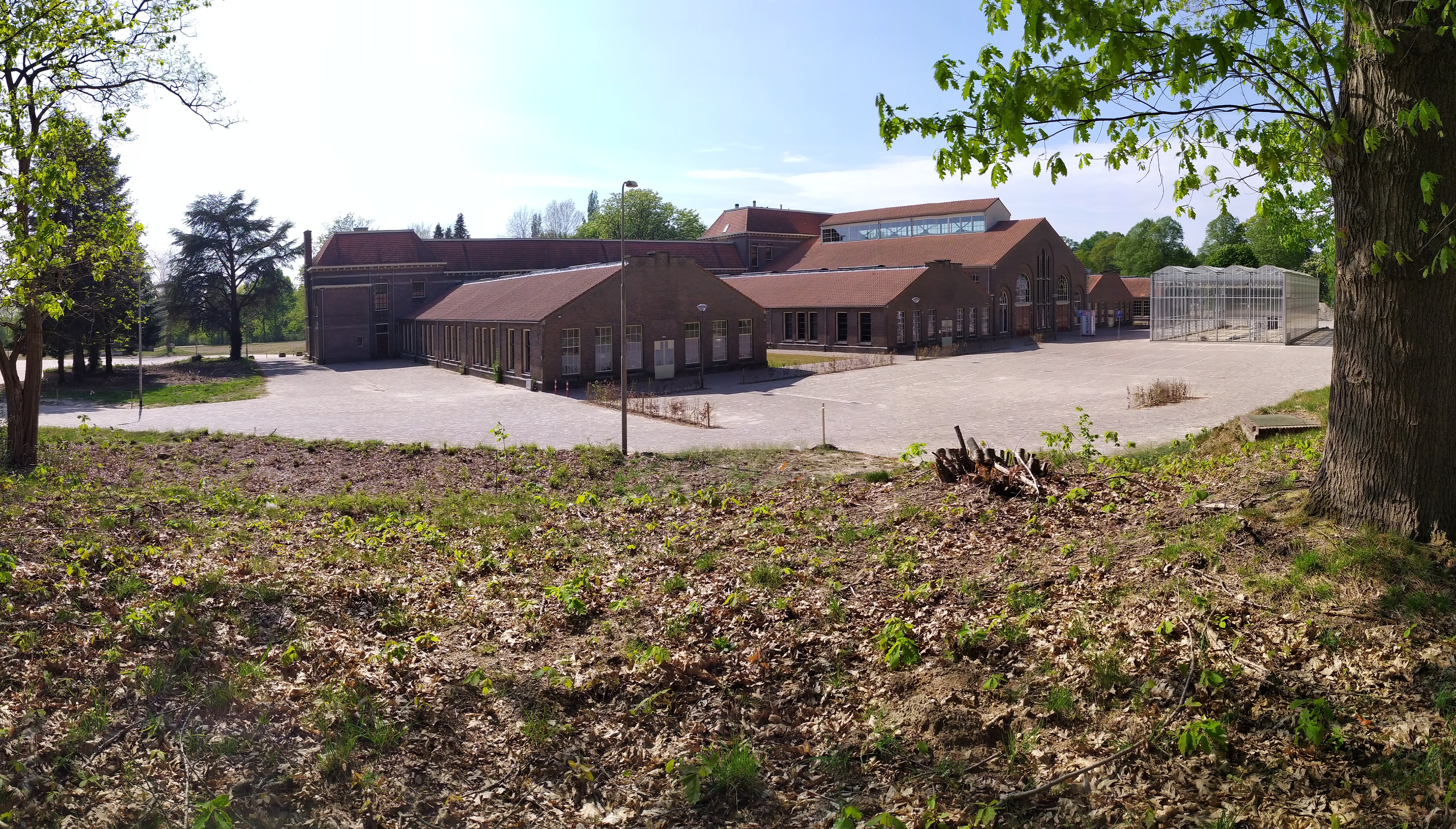 Voormalige Mauritskazerne Ede achterzijde